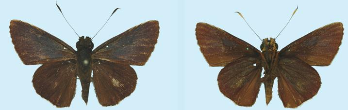 Sabera metallica upperside (left), underside (right)